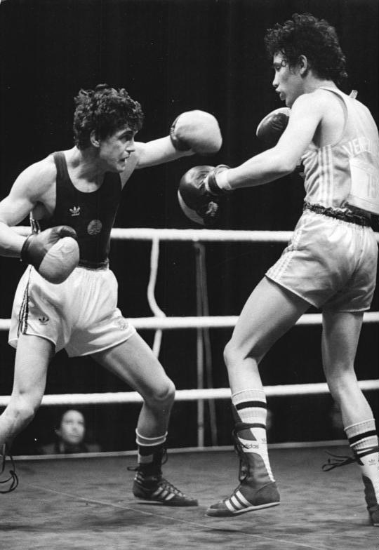 Frank Rauschning, Omar Catari ADN-ZB Lehmann 11.3.83 Halle: XII. Internationales Boxturnier um den Chemiepokal-Der 20jährige DDR-Federgewichtsmeister Frank Rauschning (links) besiegte am 10.3.83 nach einer ausgezeichneten Leistung Omar Catari (Venezuela) in der zweiten Runde durch RSC. Im Finale ist nun Antonio Acea (Kuba) sein Gegner.